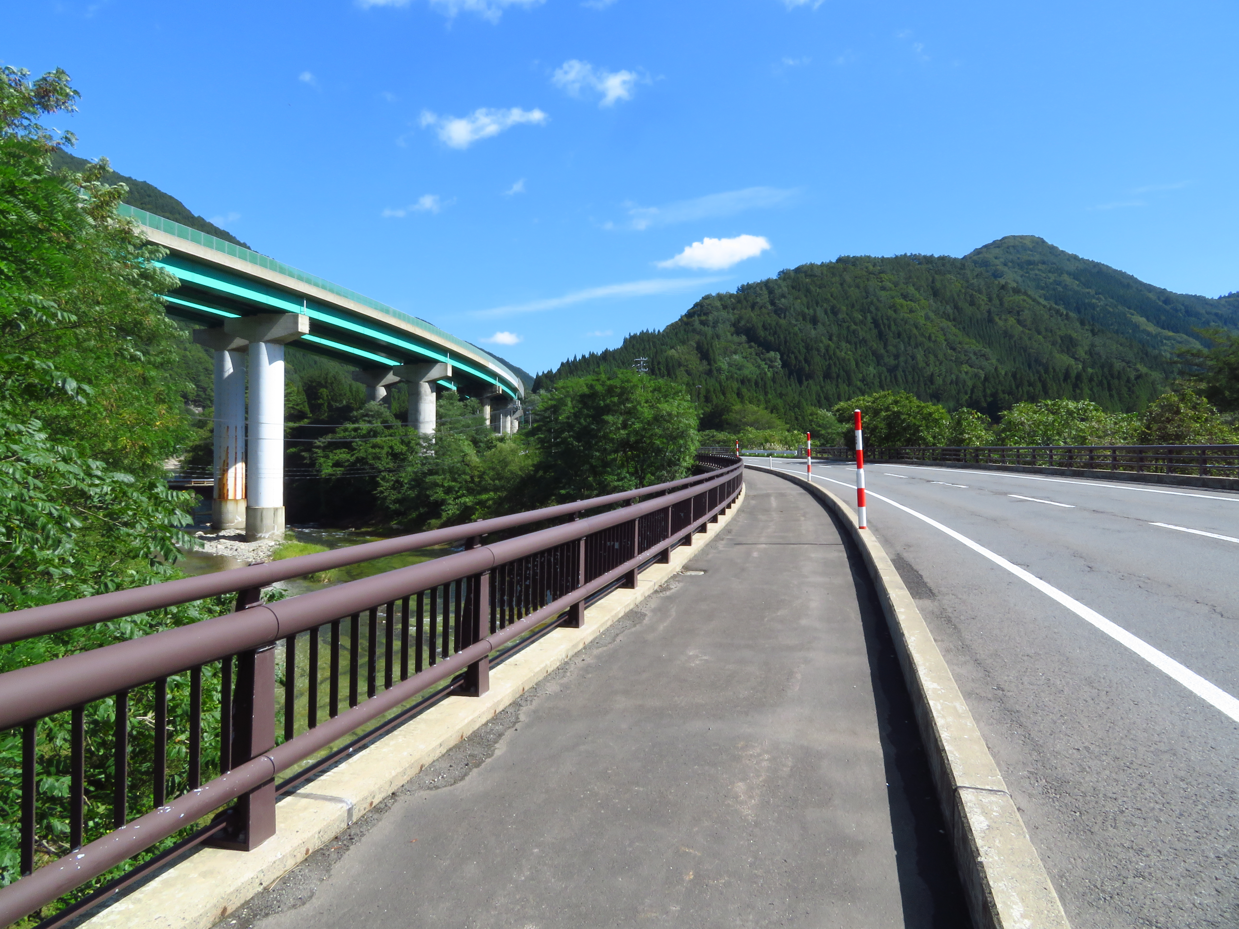 国道282号湯瀬温泉郷橋と東北道居熊井橋：秋田県鹿角市 Canon PowerShot SX720 HS